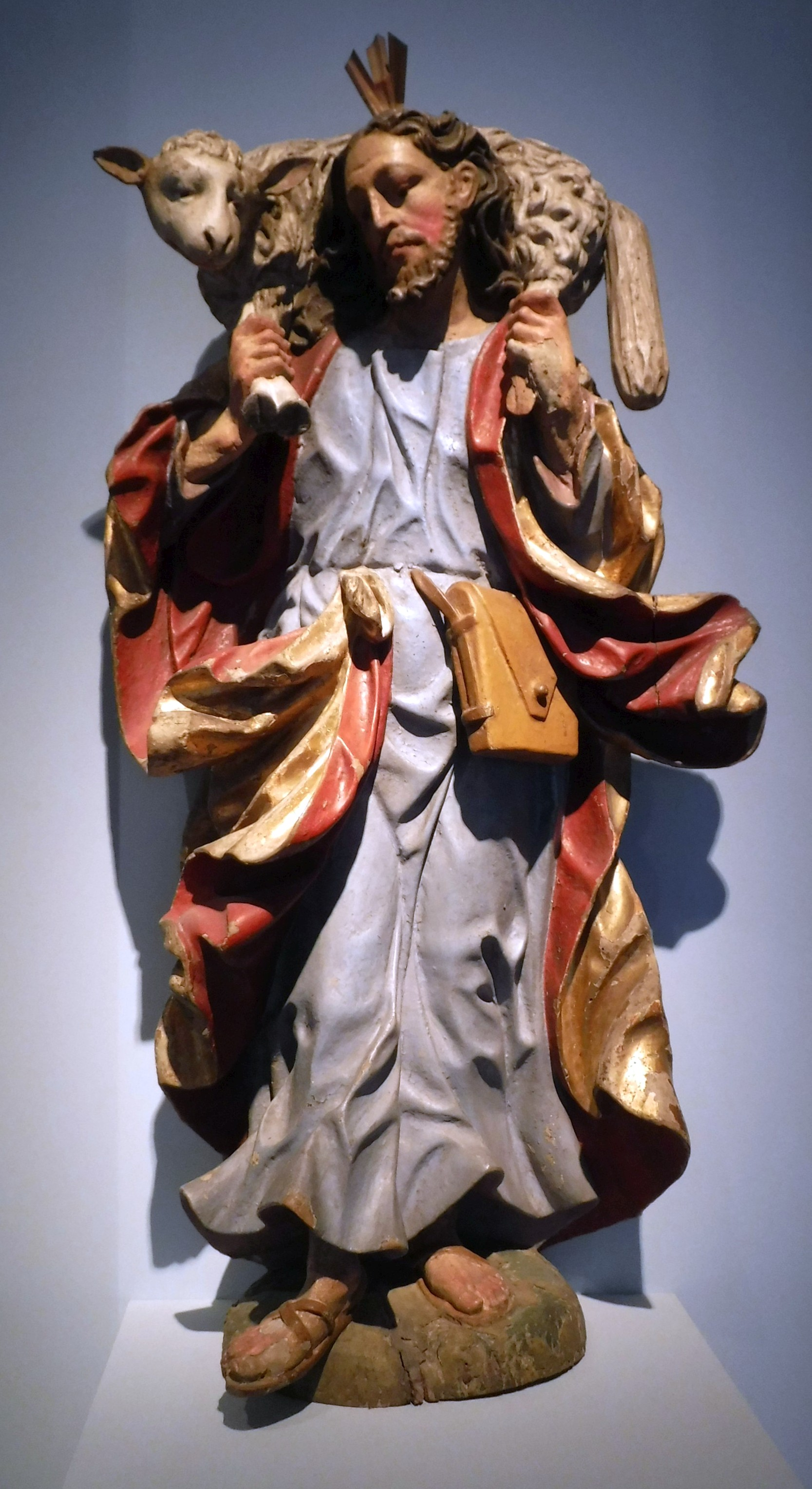 Christus als guter Hirte im Maximilianmuseum (Augsburg). Landsberg um 1700, Lindenholz farbig gefasst und vergoldet. Lorenz Luidl (1645-1719).